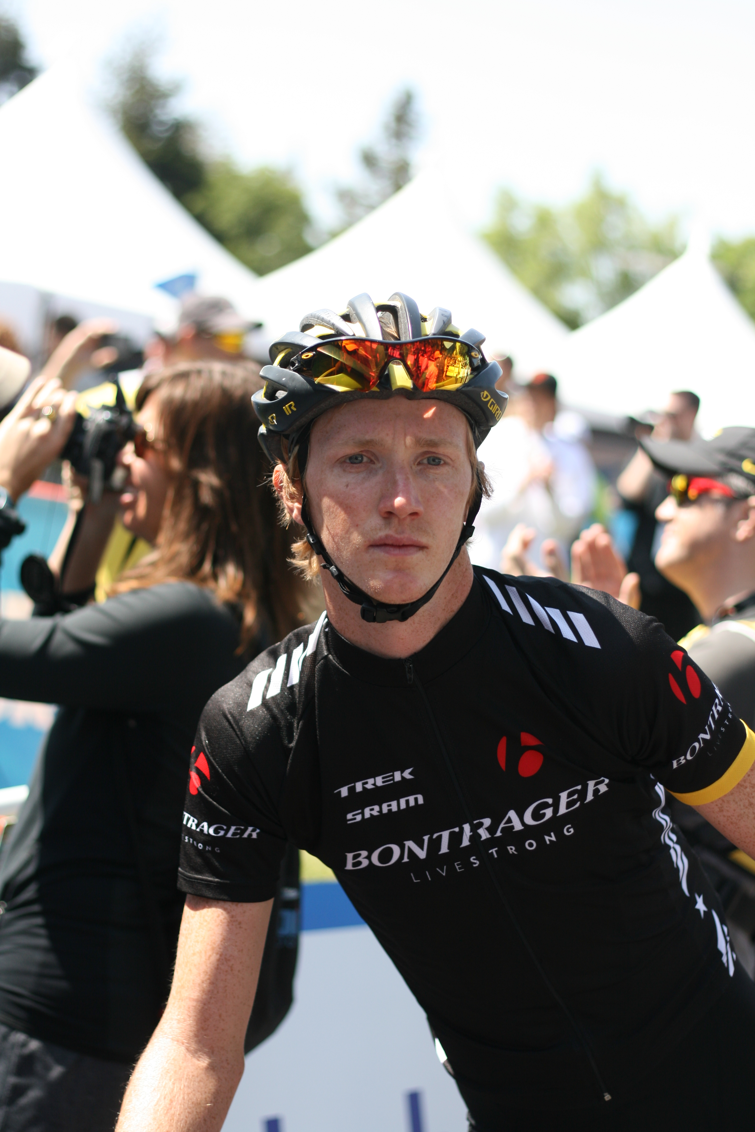 2e étape (Santa Cruz) du Tour de Californie Picture by Richard Masoner